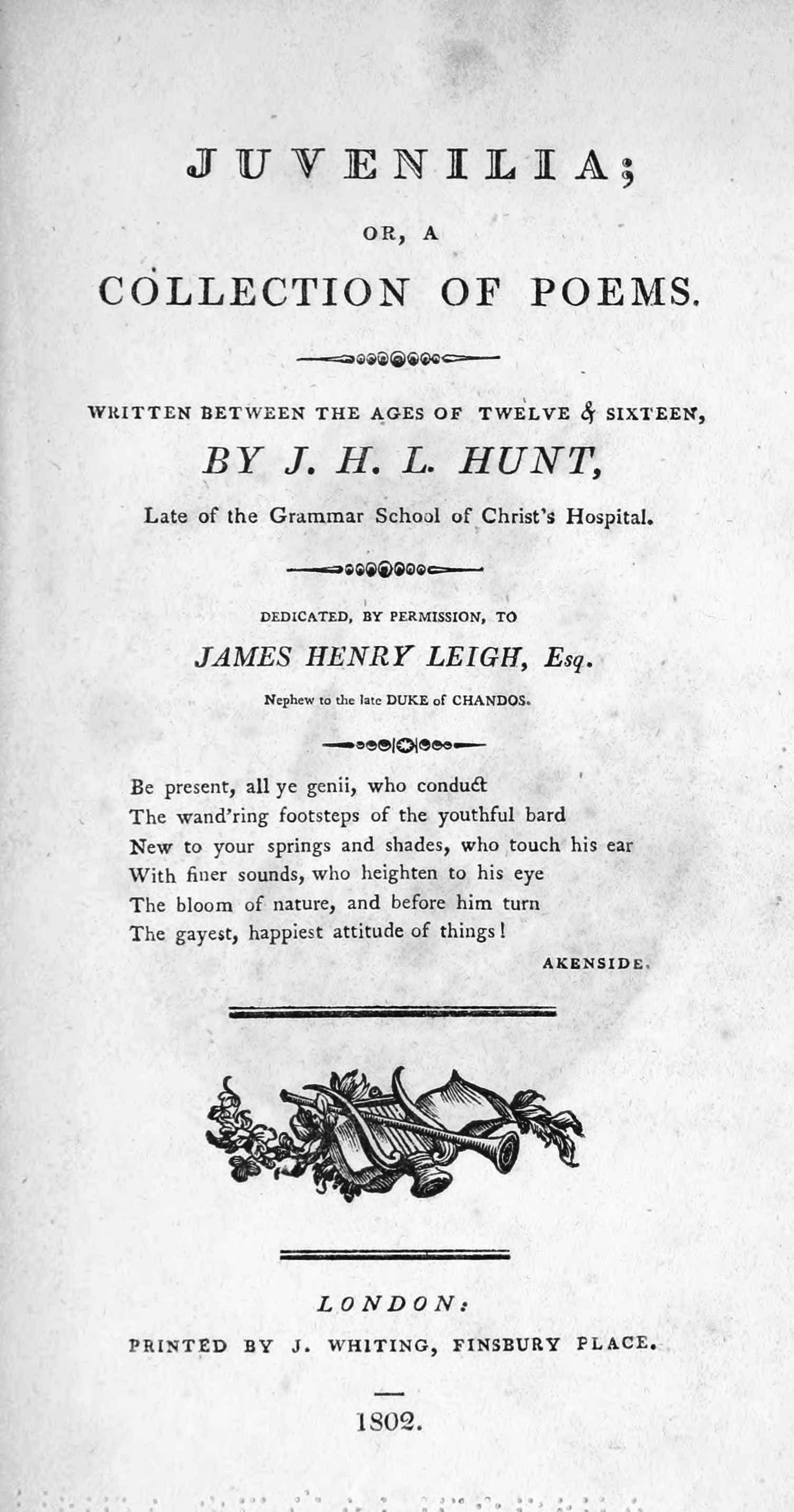 1802 title page